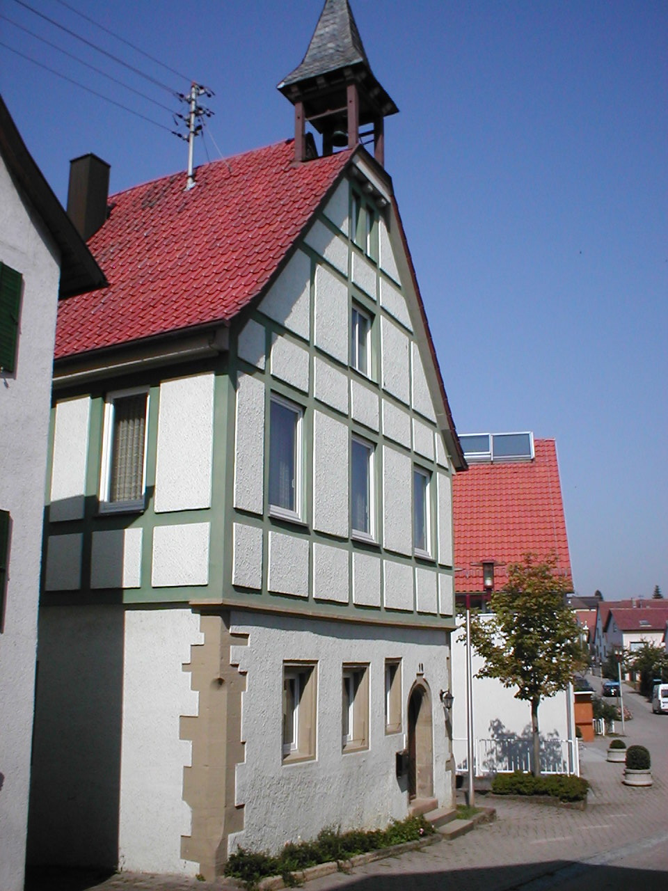 Altes Rathaus in Fürfeld